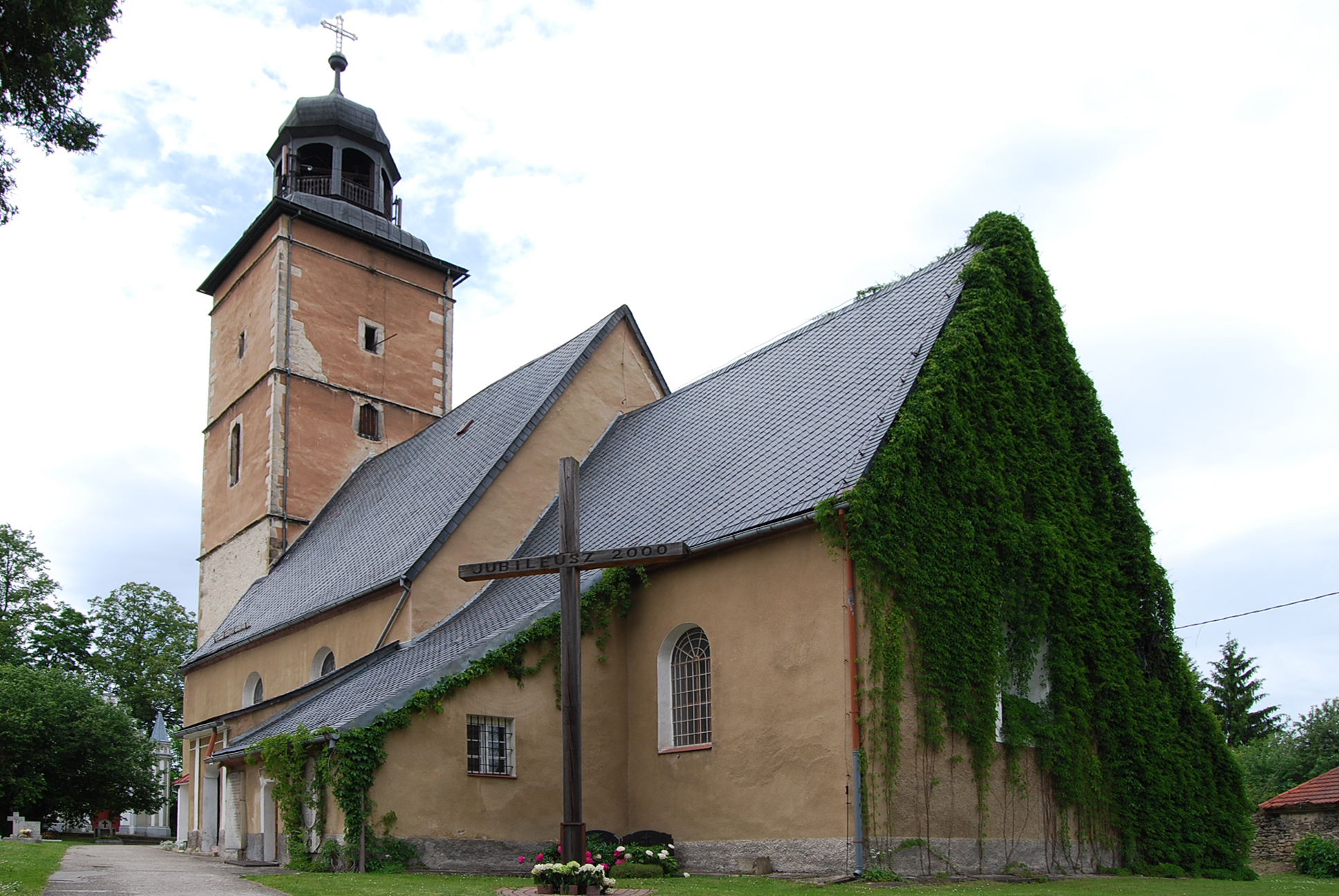 Łomnica - kościół parafialny pw. Niepokalanego Poczęcia NMP